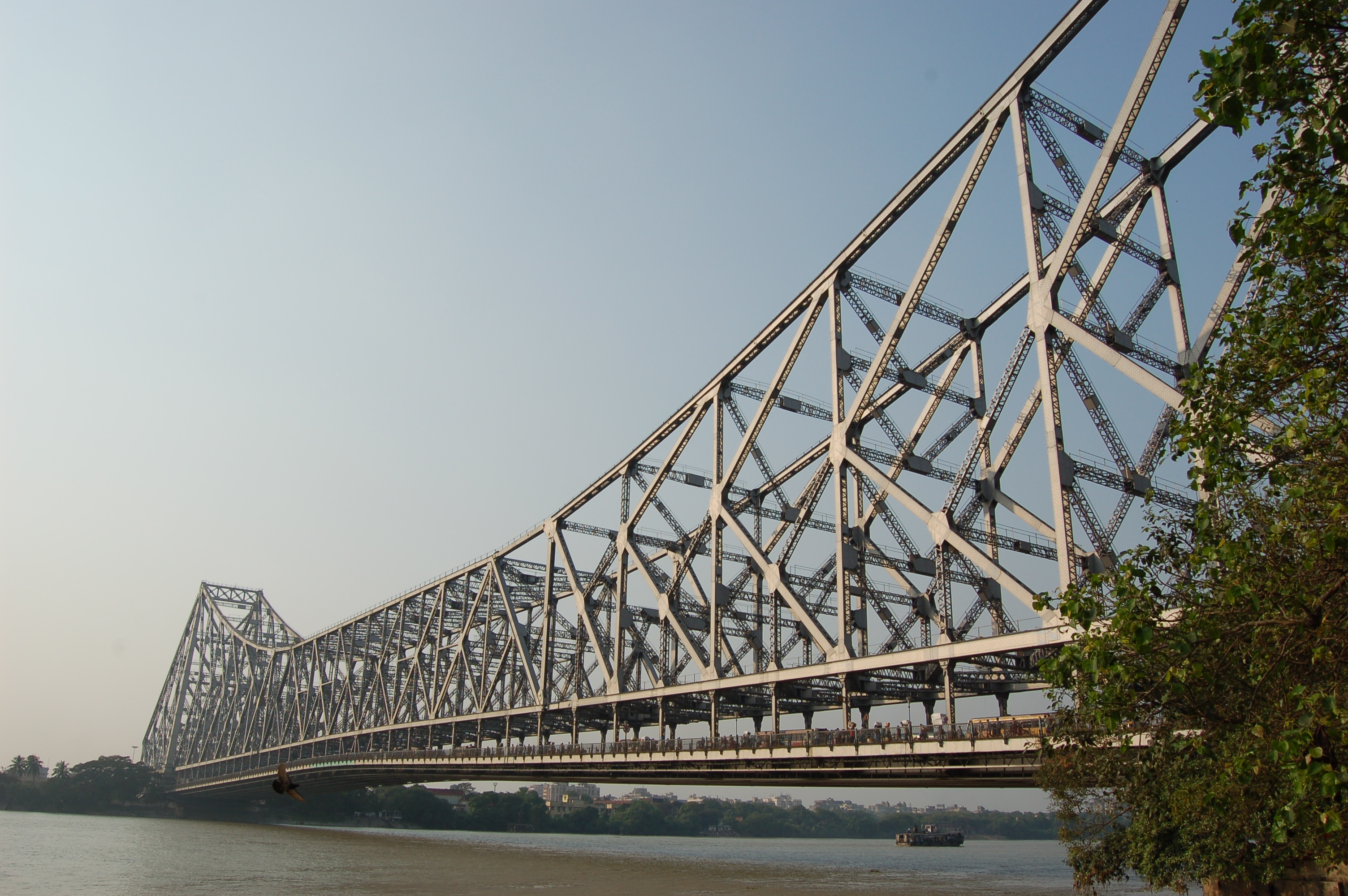 Howrah Bridge, Kolkota